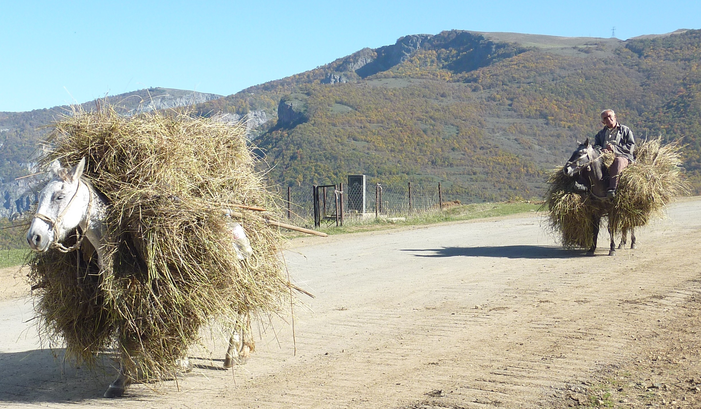 Deux ânes chargés près du monastère de Tatév